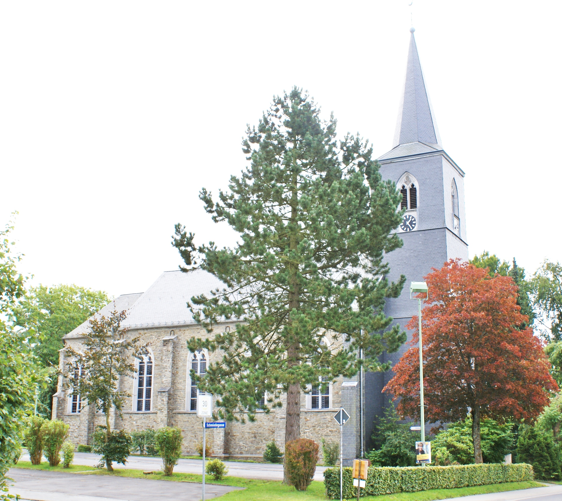 Monschau-Höfen Hauptstrasse 45 PfarrkircheThis is a photograph of an architectural monument., no. 360